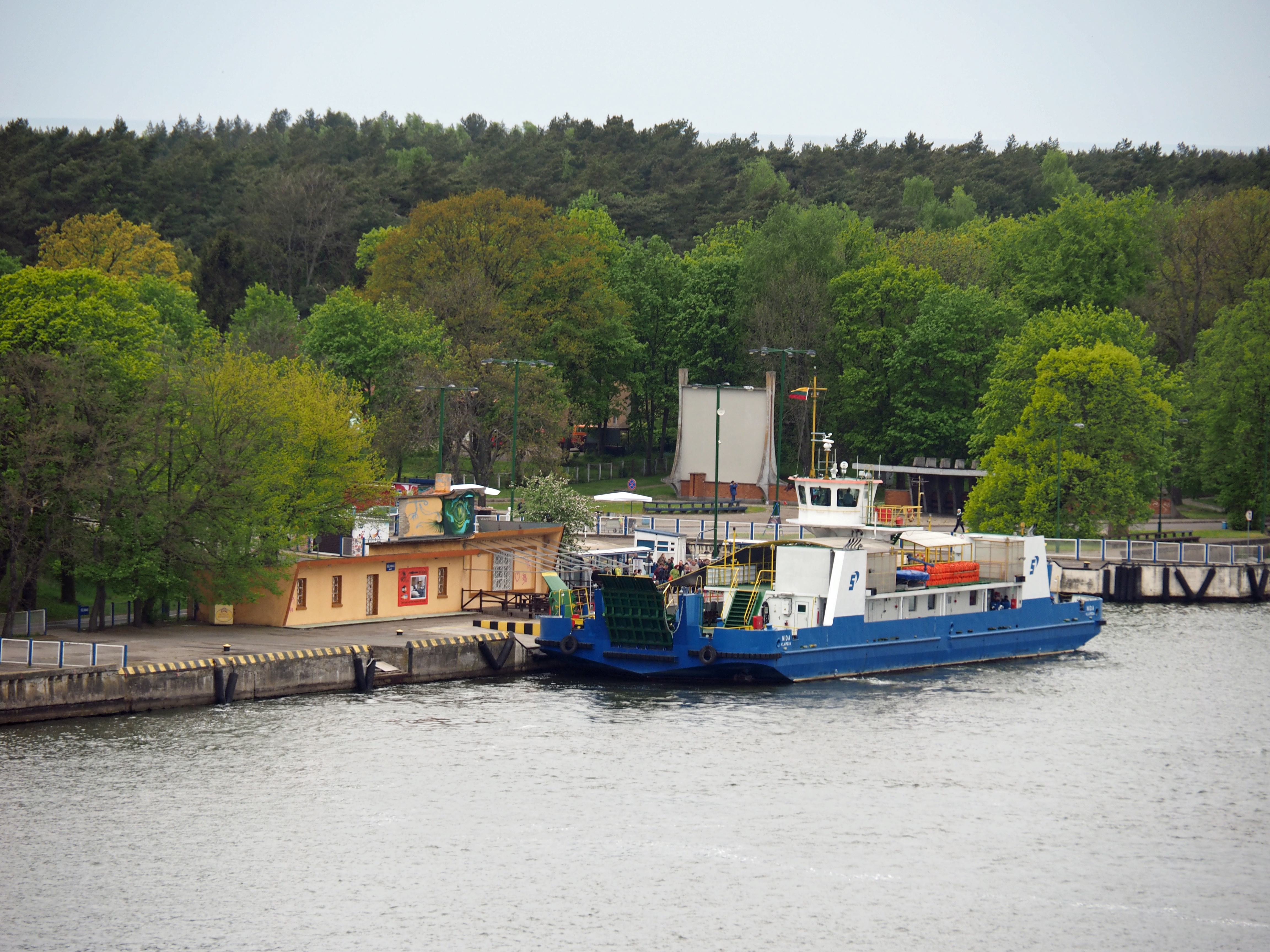 Die Fähre von Kleipeda hat in Smiltynė angelegt